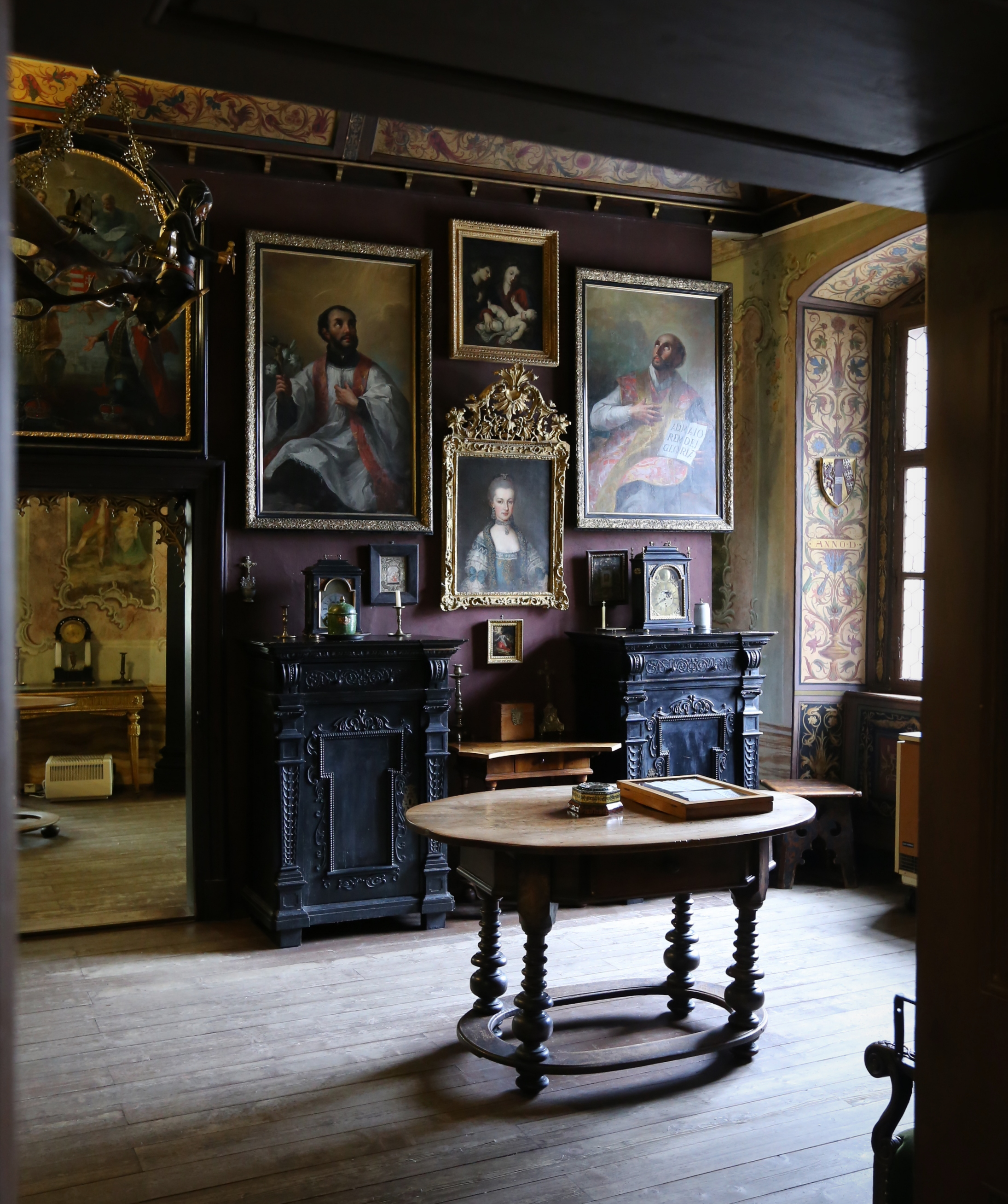 Stornó ház